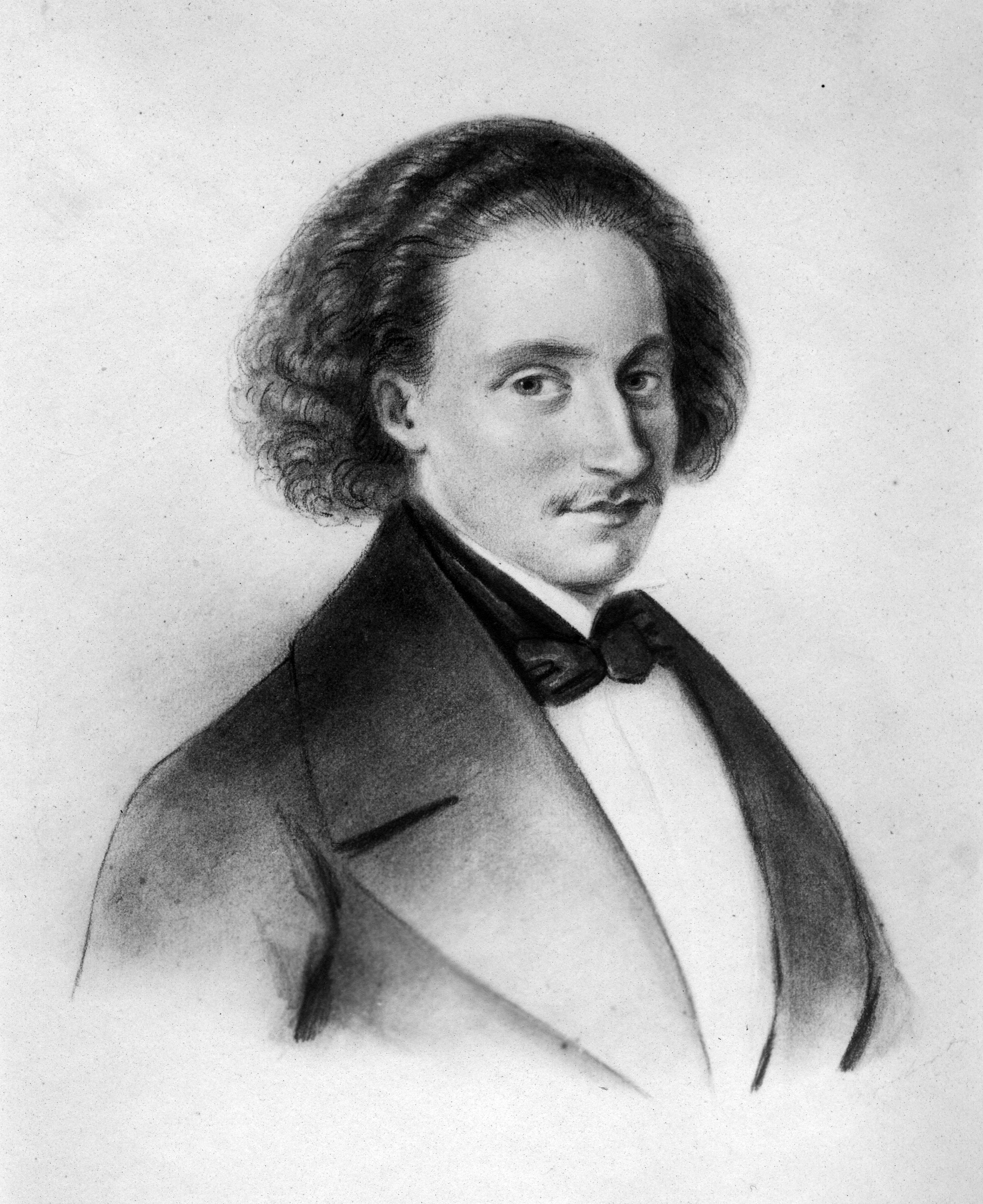 Format: Fotopositiv. Trondhjemsk pianist og komponist; student og venn av komponisten Frédéric Chopin. Ansett som en av de største pianister i sin samtid. Gravlagt i Paris. Litteratur: Dalaker, Ingrid Loe (2005): Thomas Tellefsen i norsk og fransk musikkultur. Doktoravhandling ved NTNU. Huldt-Nystrøm, Hampus (1959): Thomas Dyke Acland Tellefsen. Se også